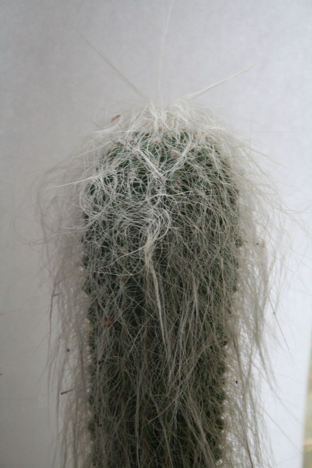 Cephalocereus senilis fiatal hajtása